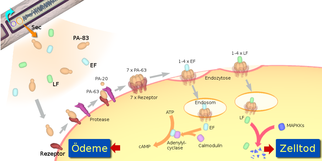 Schema des Vergiftungsprozesses von Milbrandtoxin in Wirbeltierzellen